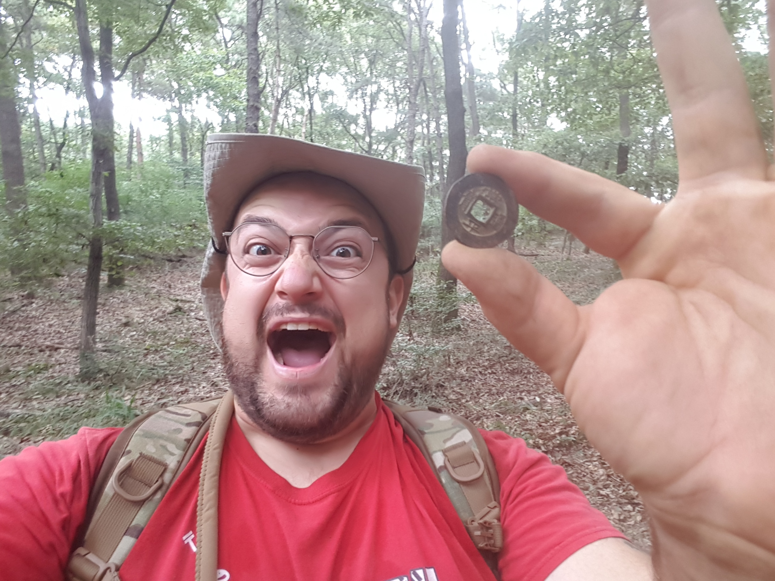 유튜버 "미국아재"